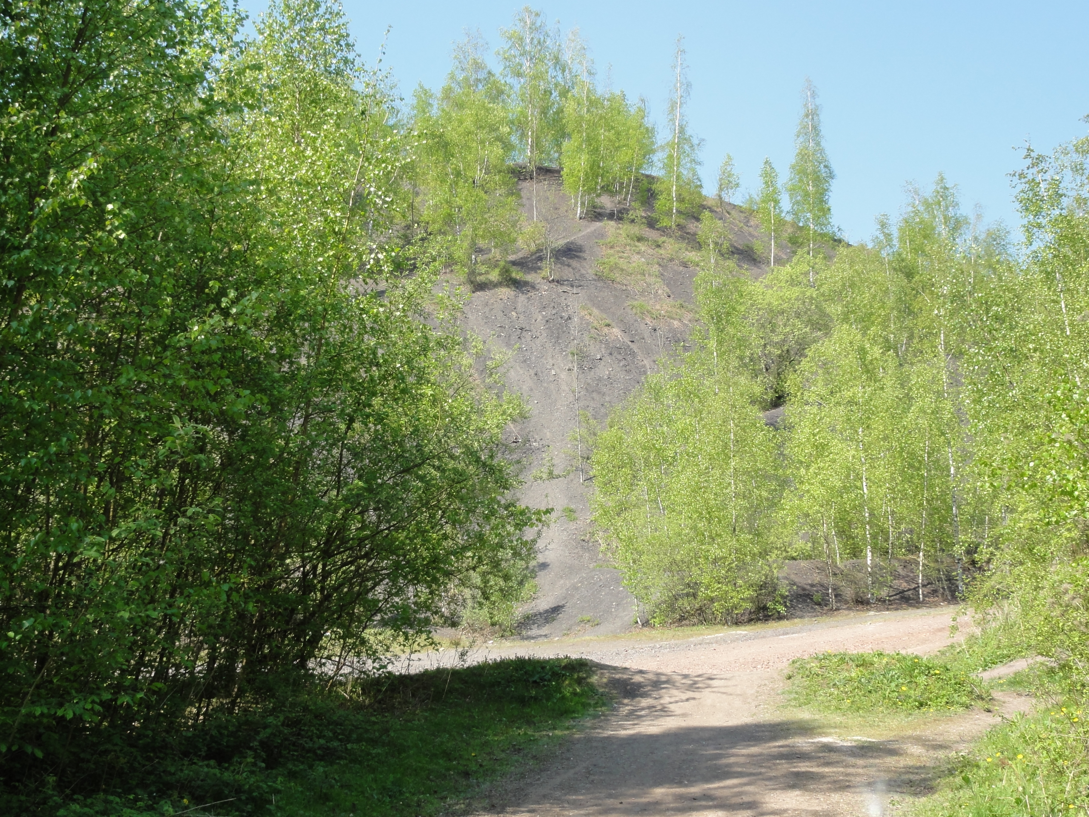 Terril n° 174 dit Sabatier Sud, Fosse Sabatier de la Compagnie des mines d'Anzin, Raismes, Nord, Nord-Pas-de-Calais, France.